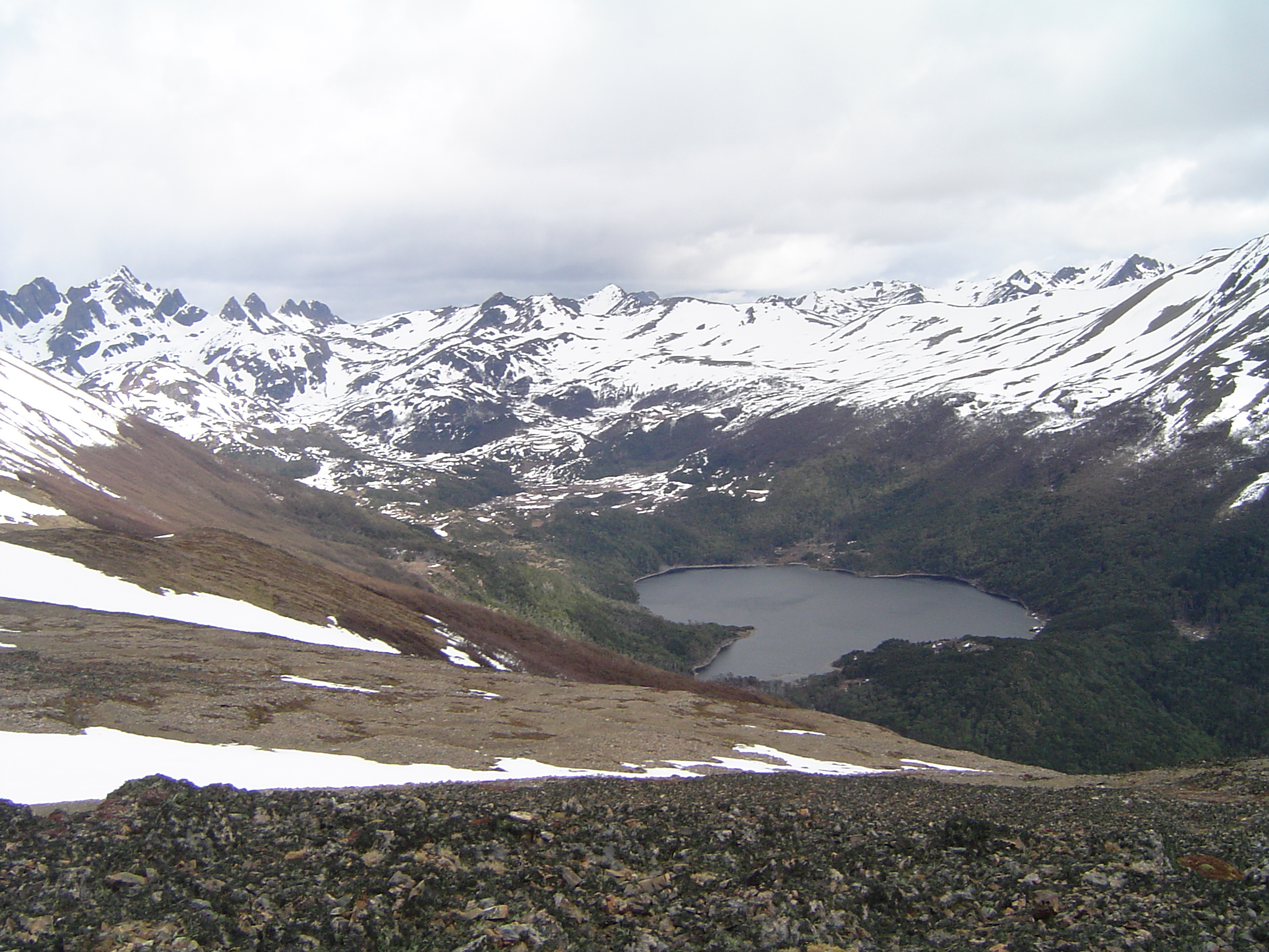 Circuito Dientes de Navarino